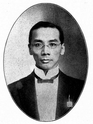 中文（台灣）: 中華民國國會議員